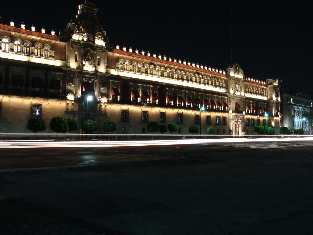 Palacio Nacional Ciudad de México DF